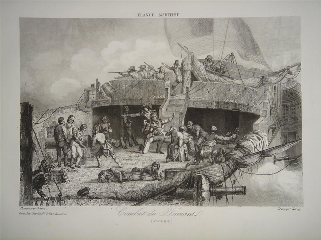 Le vaisseau le Tonnant au combat d'Aboukir et la mort héroique du capitaine de vaisseau Dupetit-Thouars le 1er aout 1798.